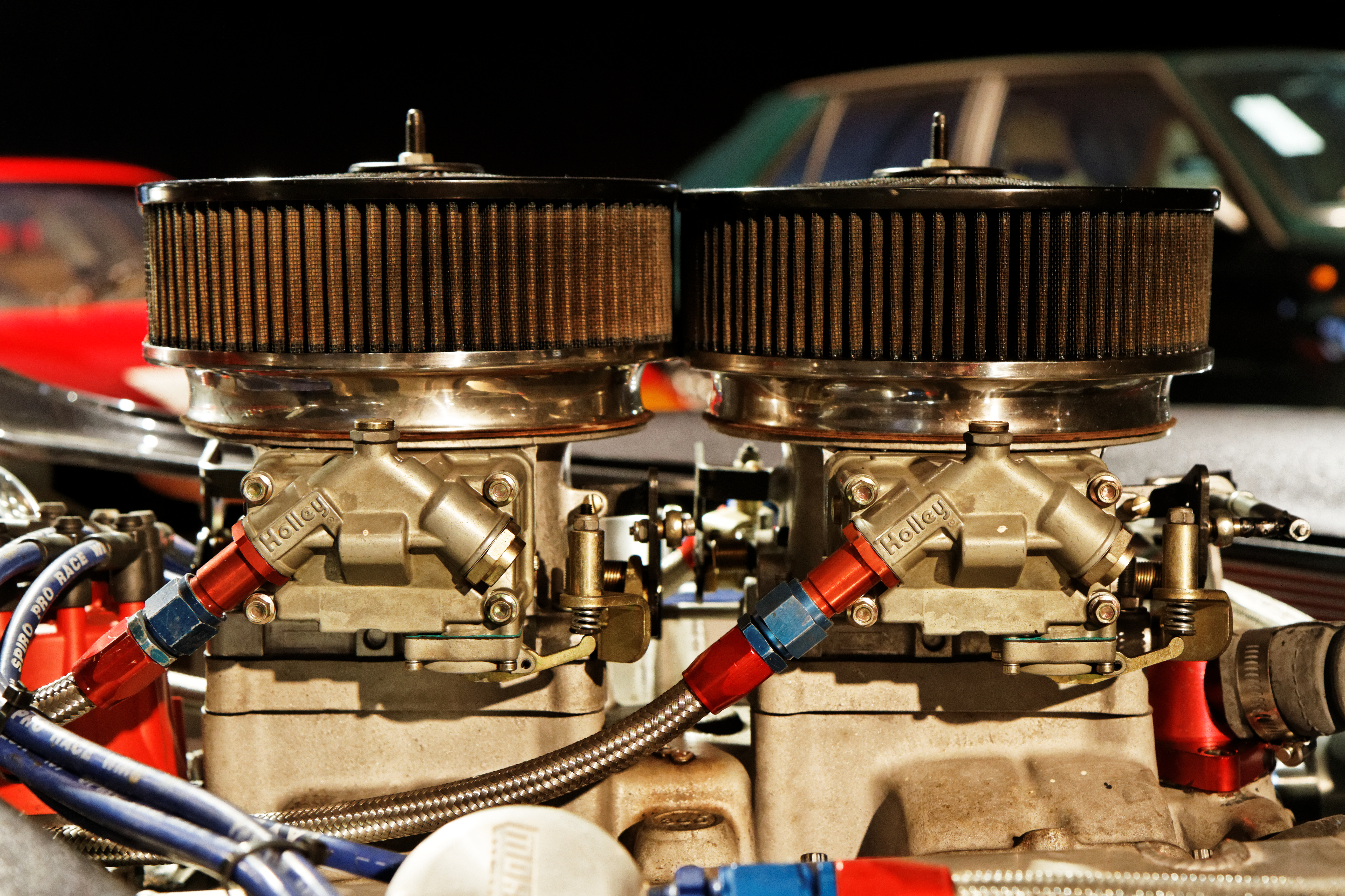 Une Weineck Cobra 780 CUI Limited Edition de 1985.